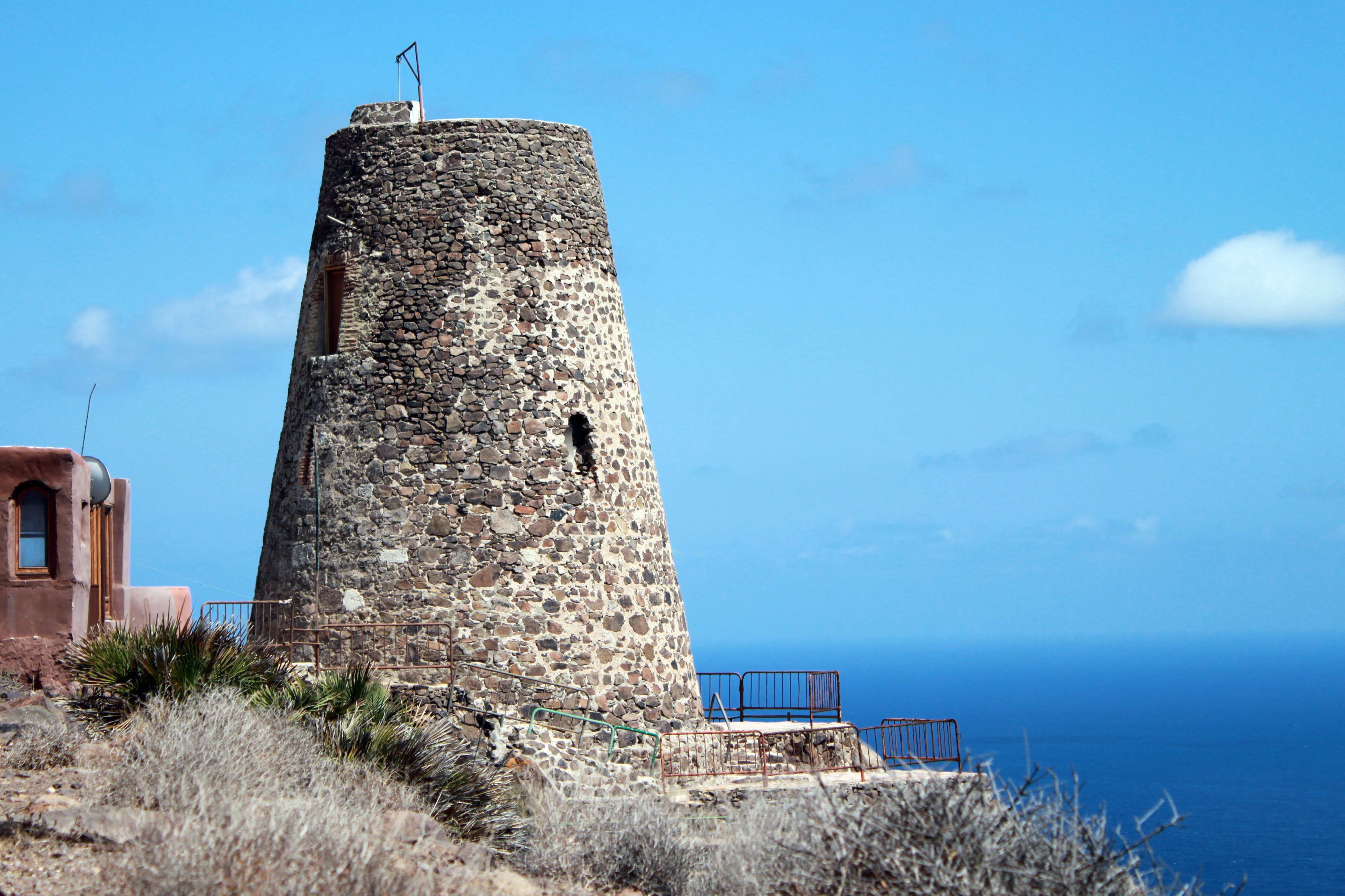 Torre de la Vela Blanca situada sobre el promontorio del mismo nombre en la localidad almeriense de Níjar (Andalucía, España). La construcción actual, edificada sobre otra precedente en el año 1767.